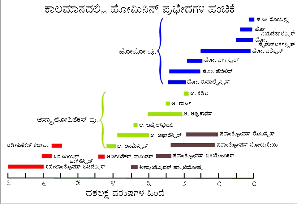 ಕನ್ನಡ: ಹೋಮಿನಿನ್ ಪ್ರಭೇದಗಳ ಹಂಚಿಕೆ